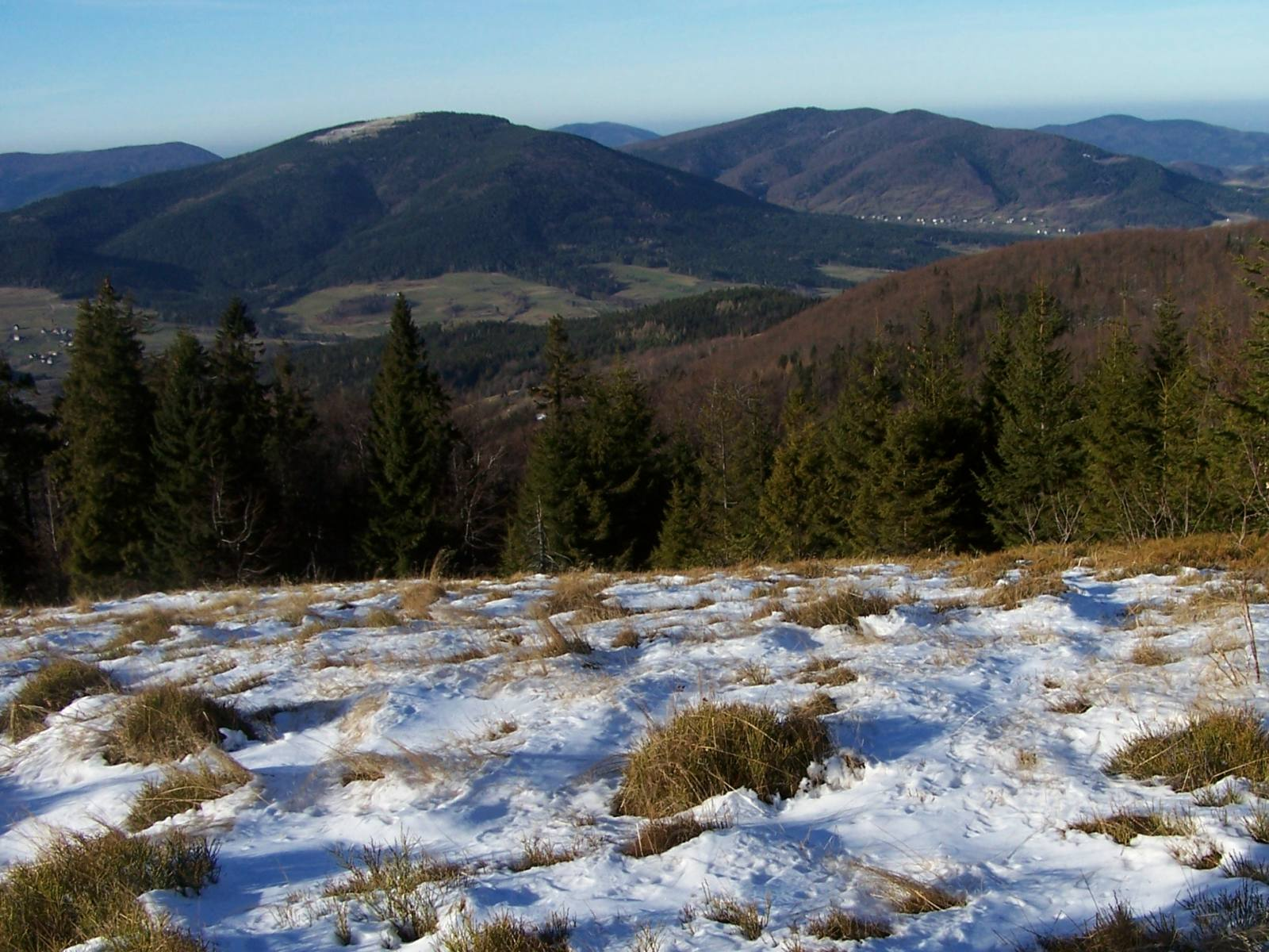 Ćwilin, Snieżnica, Ciecień (Beskid Wyspowy)